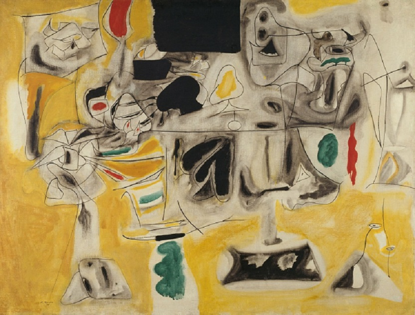 Paesaggio, tavola, Centre Pompidou, Paris